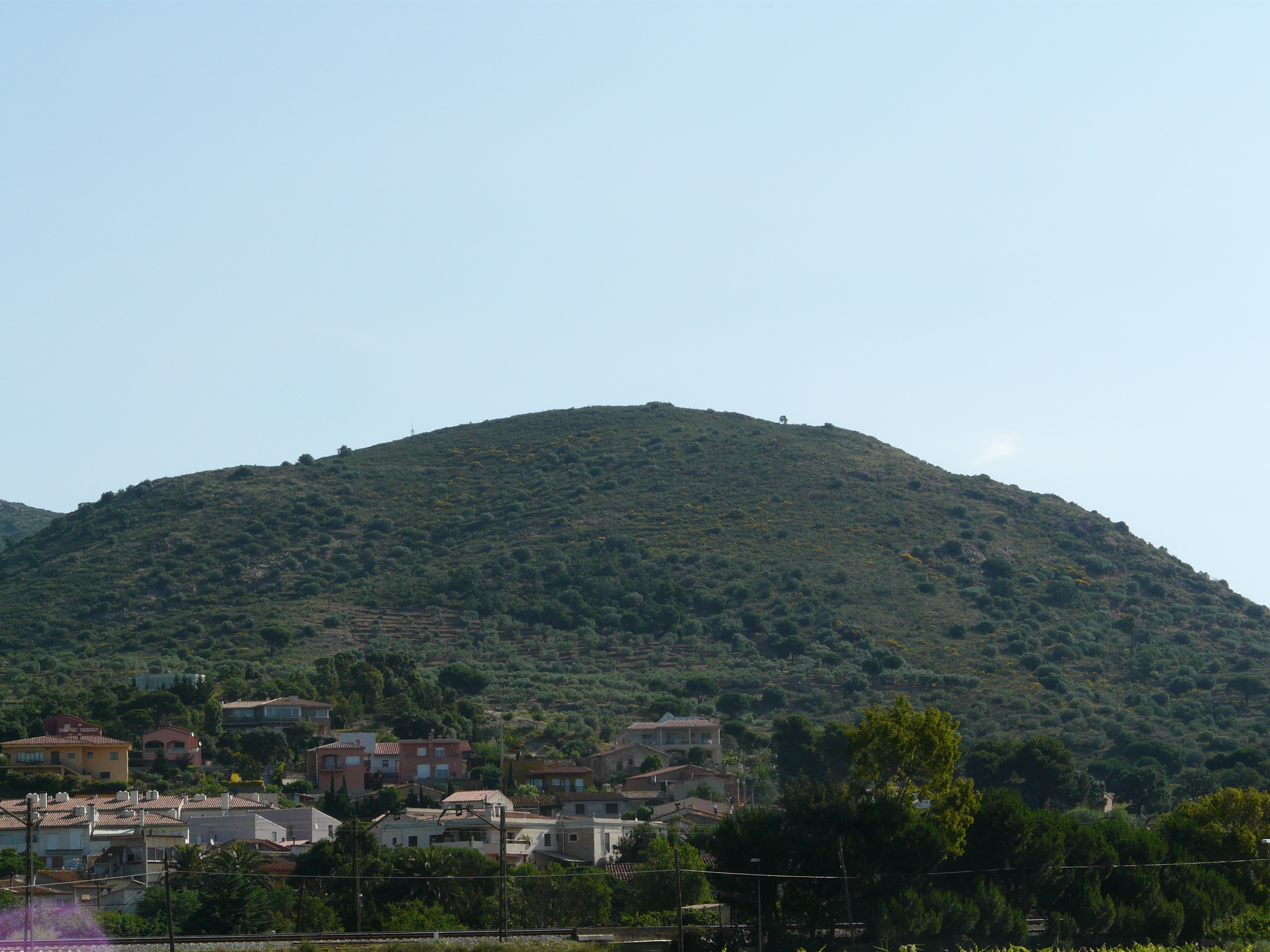 Veïnat de Dalt de Vilajuïga al peu del puig de l'Ullastre This is a a photo of a natural area in Catalonia, Spain, with id: ES510092